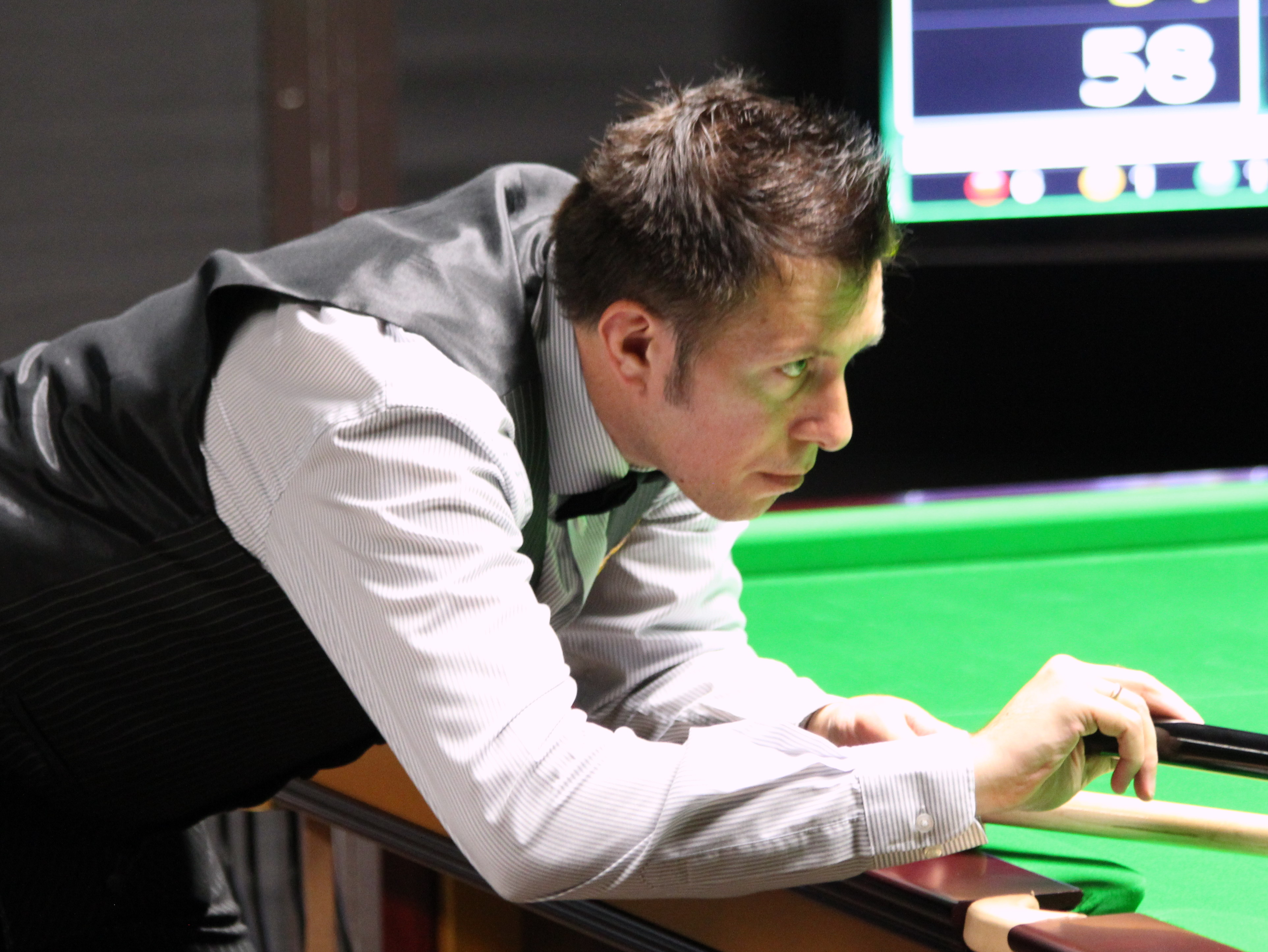 Dominic Dale beim Paul Hunter Classic 2016